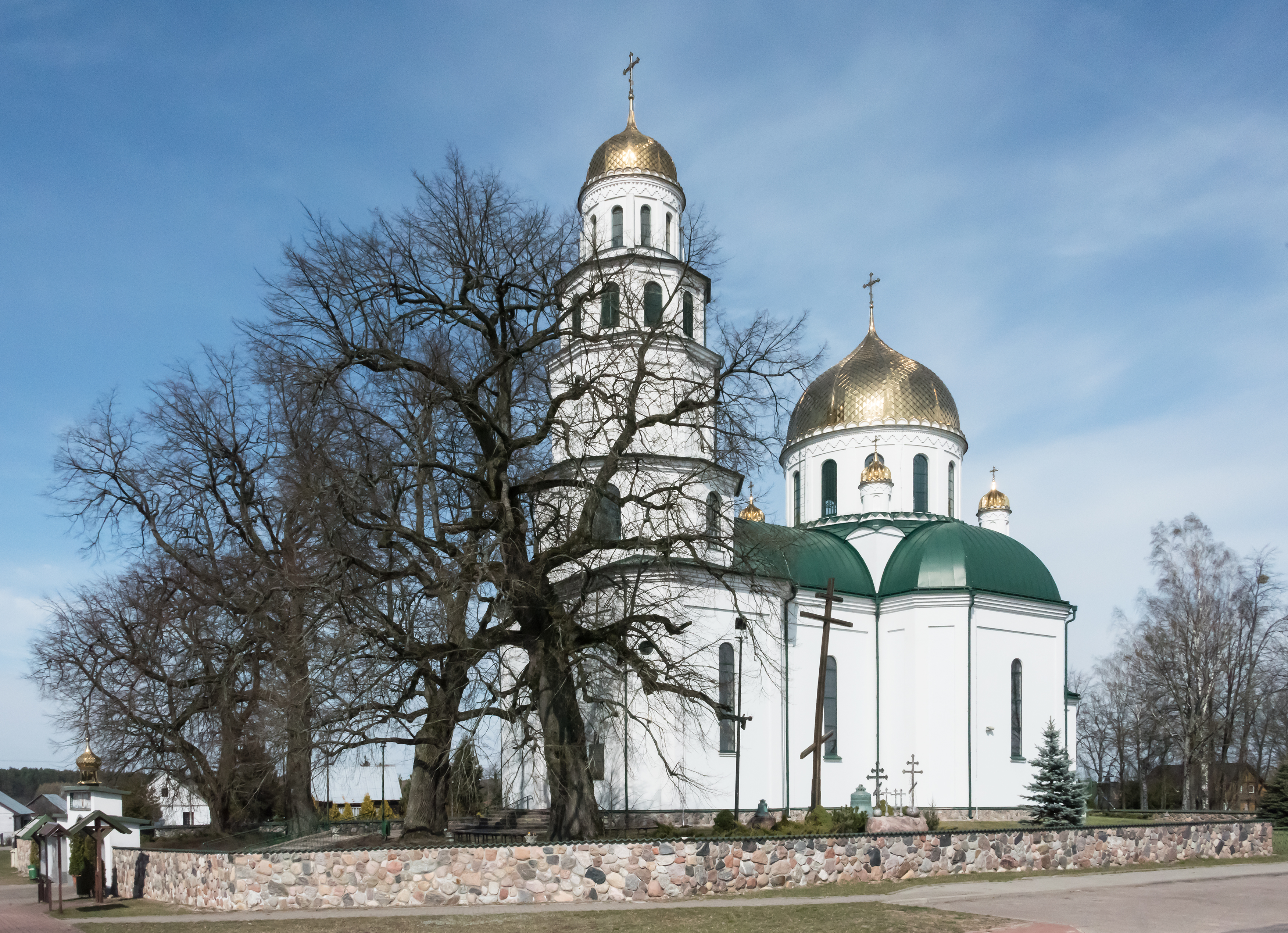 Cerkiew Narodzenia Najświętszej Marii Panny w Gródku (powiat białostocki), widok od strony ul. Michałowskiej